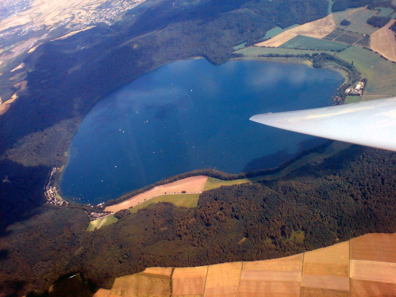 Der Laacher See aus der Luft